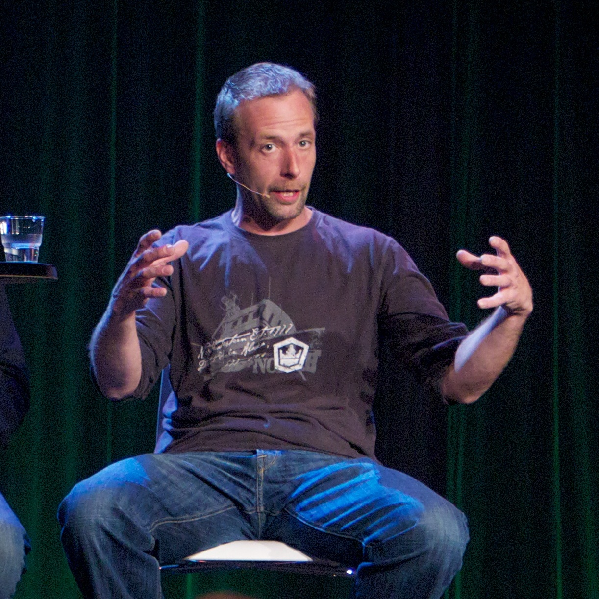 Todd Stanley